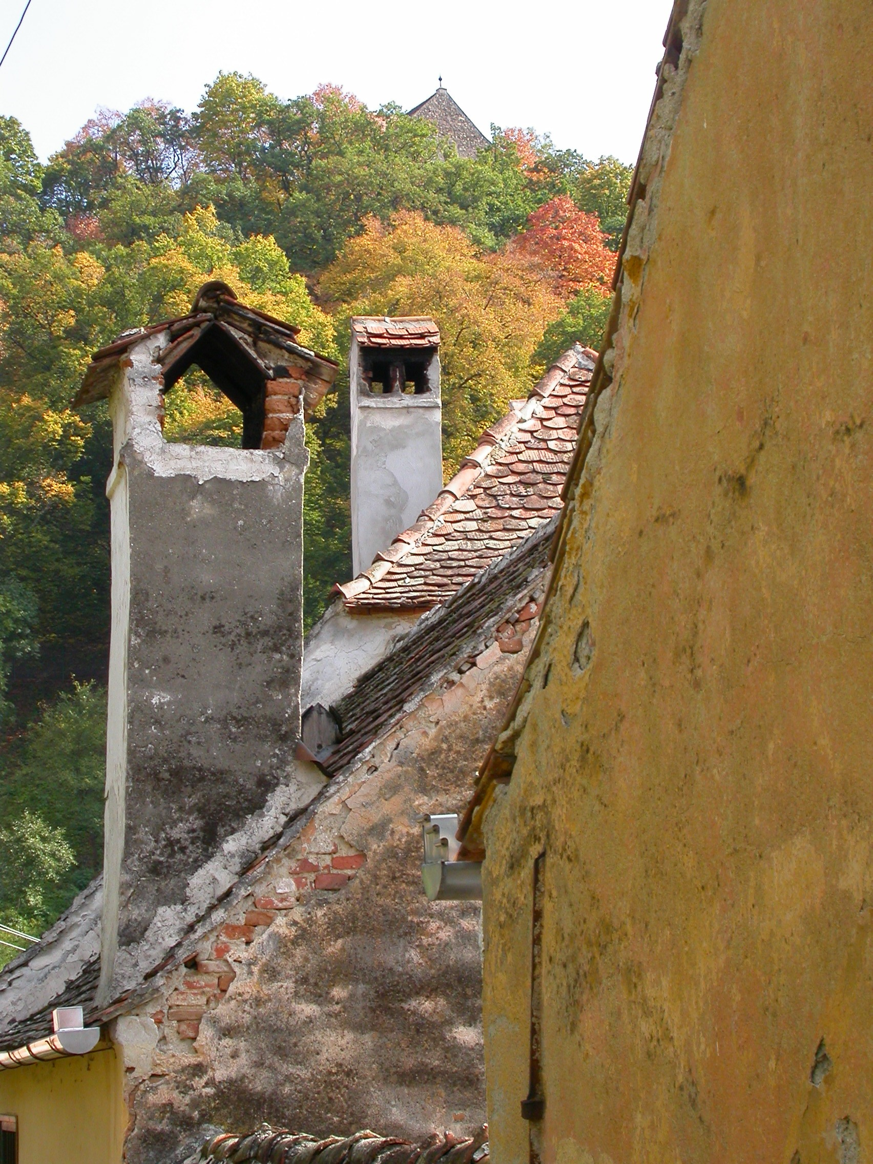 Ansamblul rural "Centrul istoric"